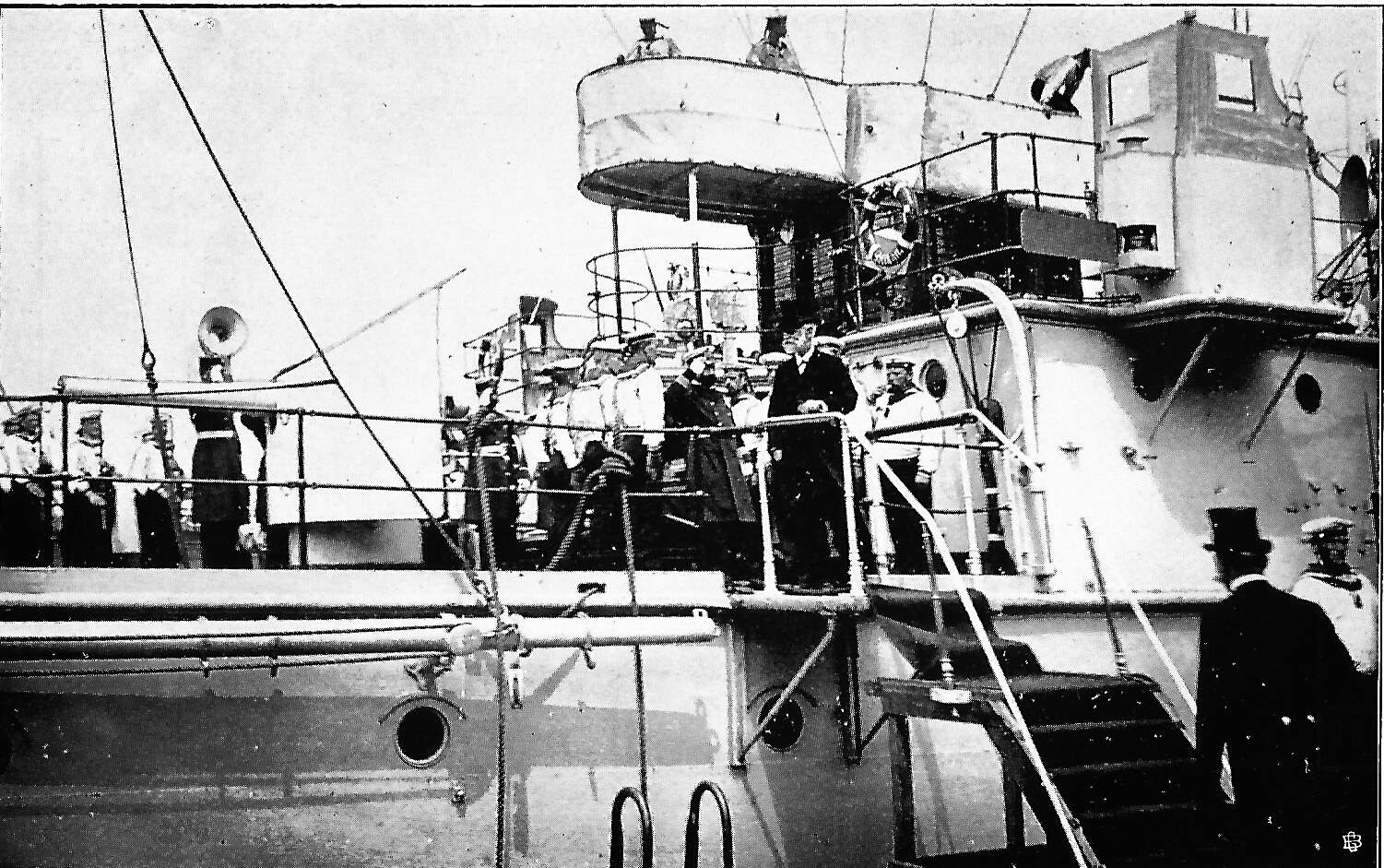 Besuch des präsidierenden Herrn Bürgermester Dr. Eschenburg an Bord S. M. S. „Pelikan“.